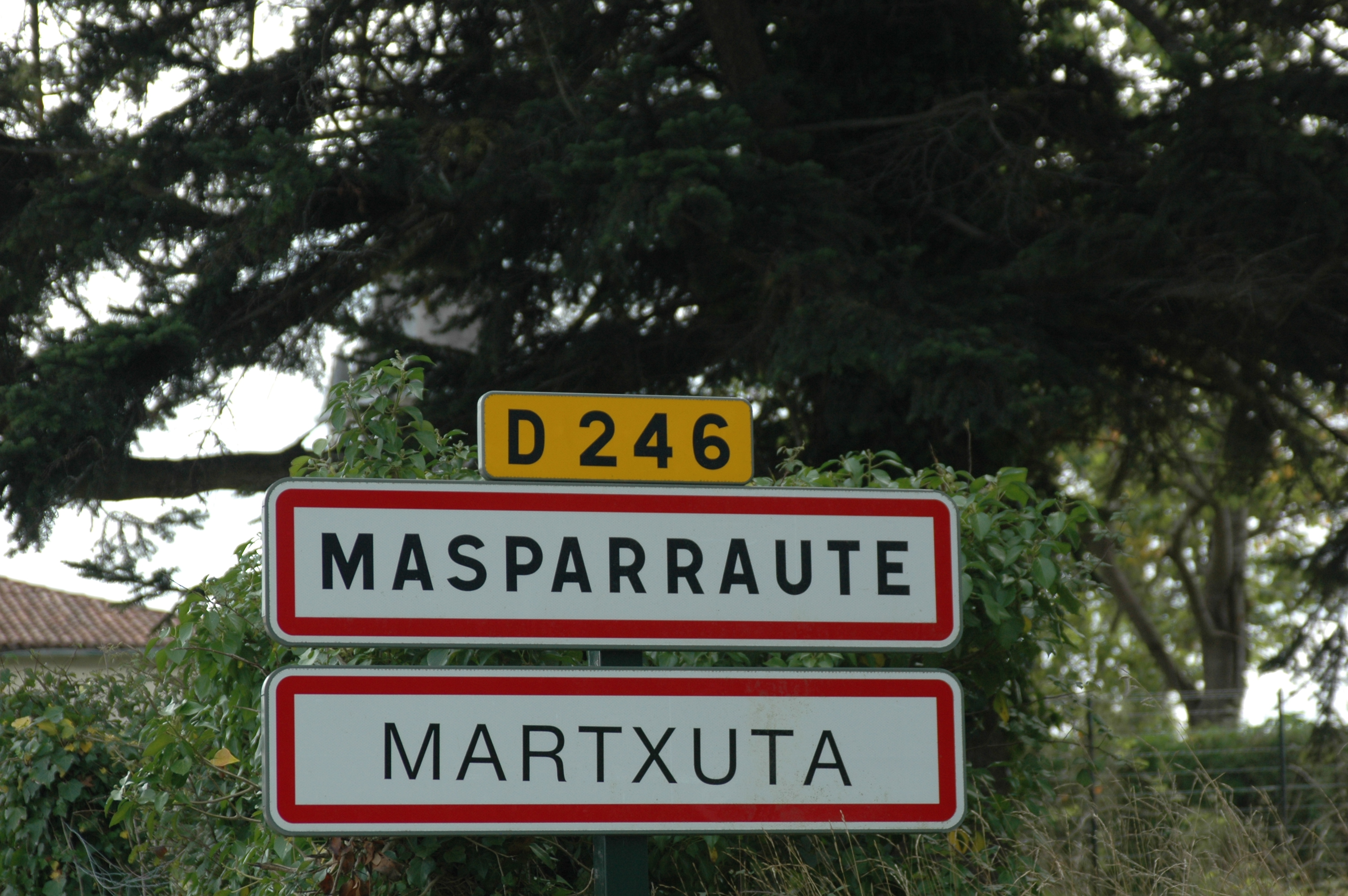 Panneau à l'entrée de Masparraute sur la D246